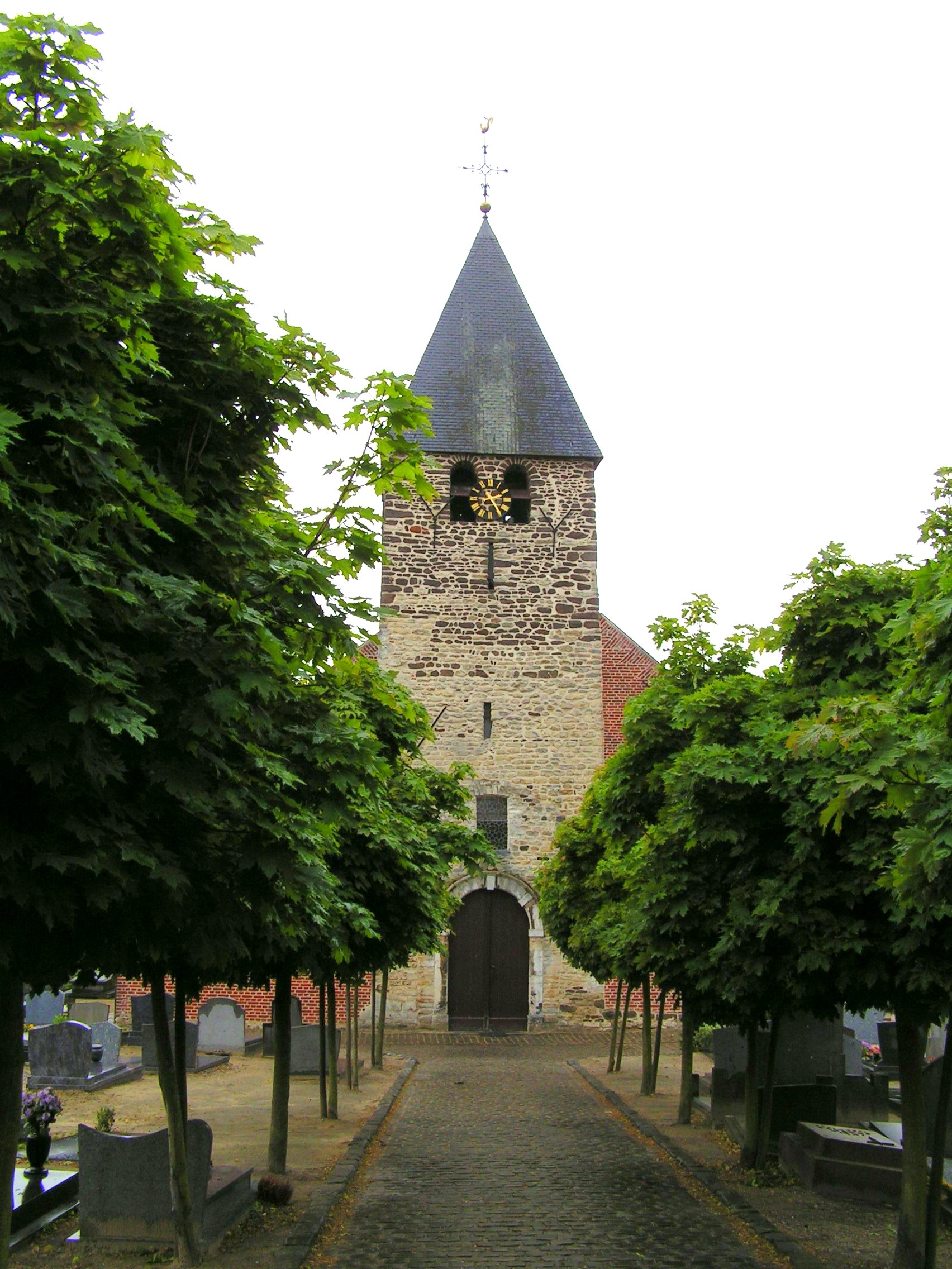 Sint Annakerk, Oud-Heverlee, Belgium.